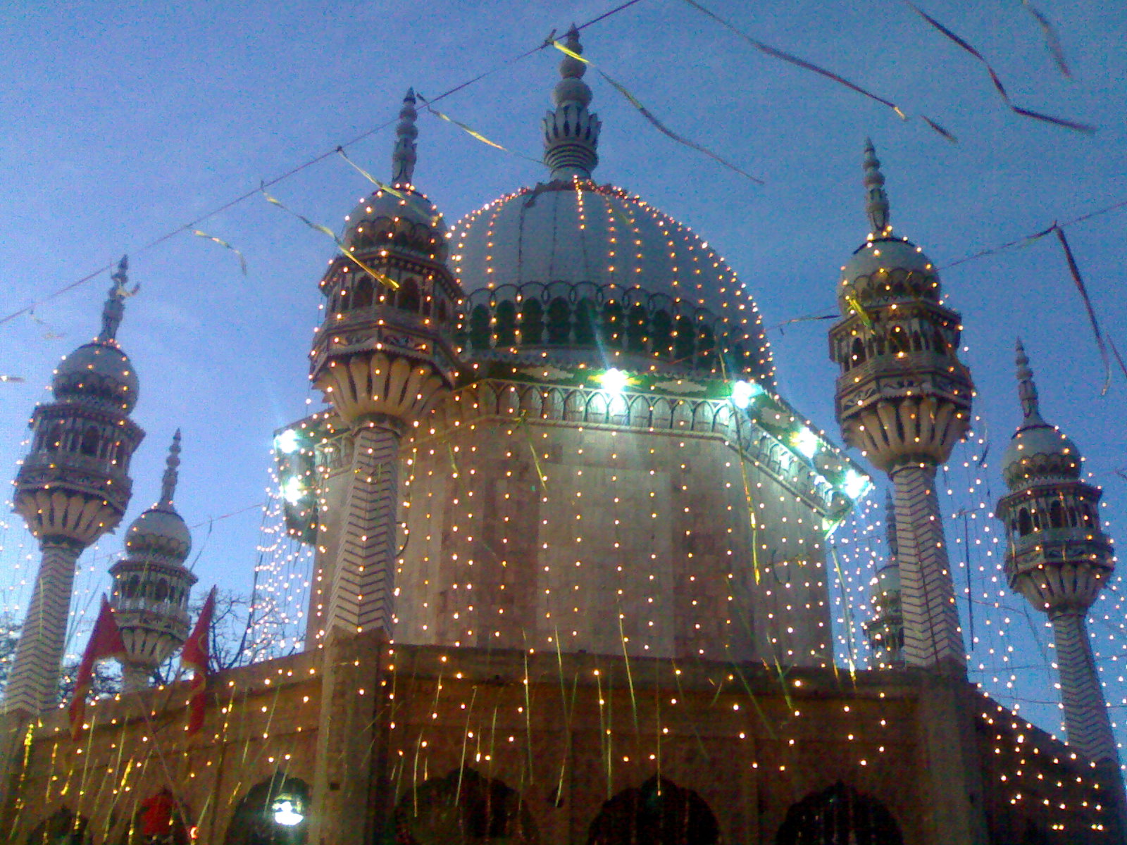 Tarigri Sharif Mezar